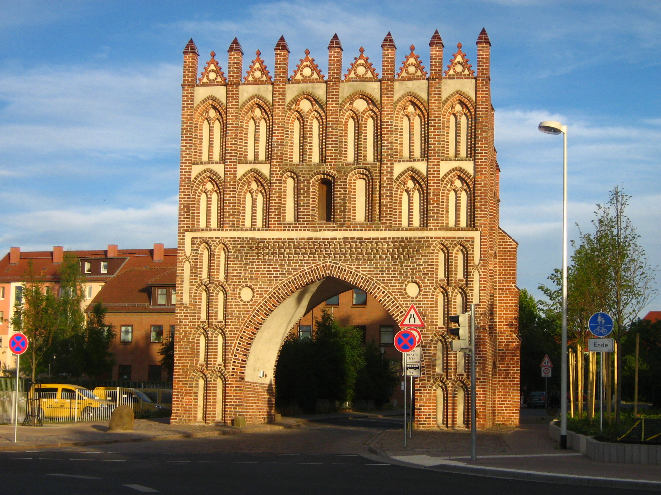 Das Kalensche Tor (nach der Stadt Neukalen benannt) in Malchin, Mecklenburg-Vorpommern. Feldseite des verbliebenen Vortores.